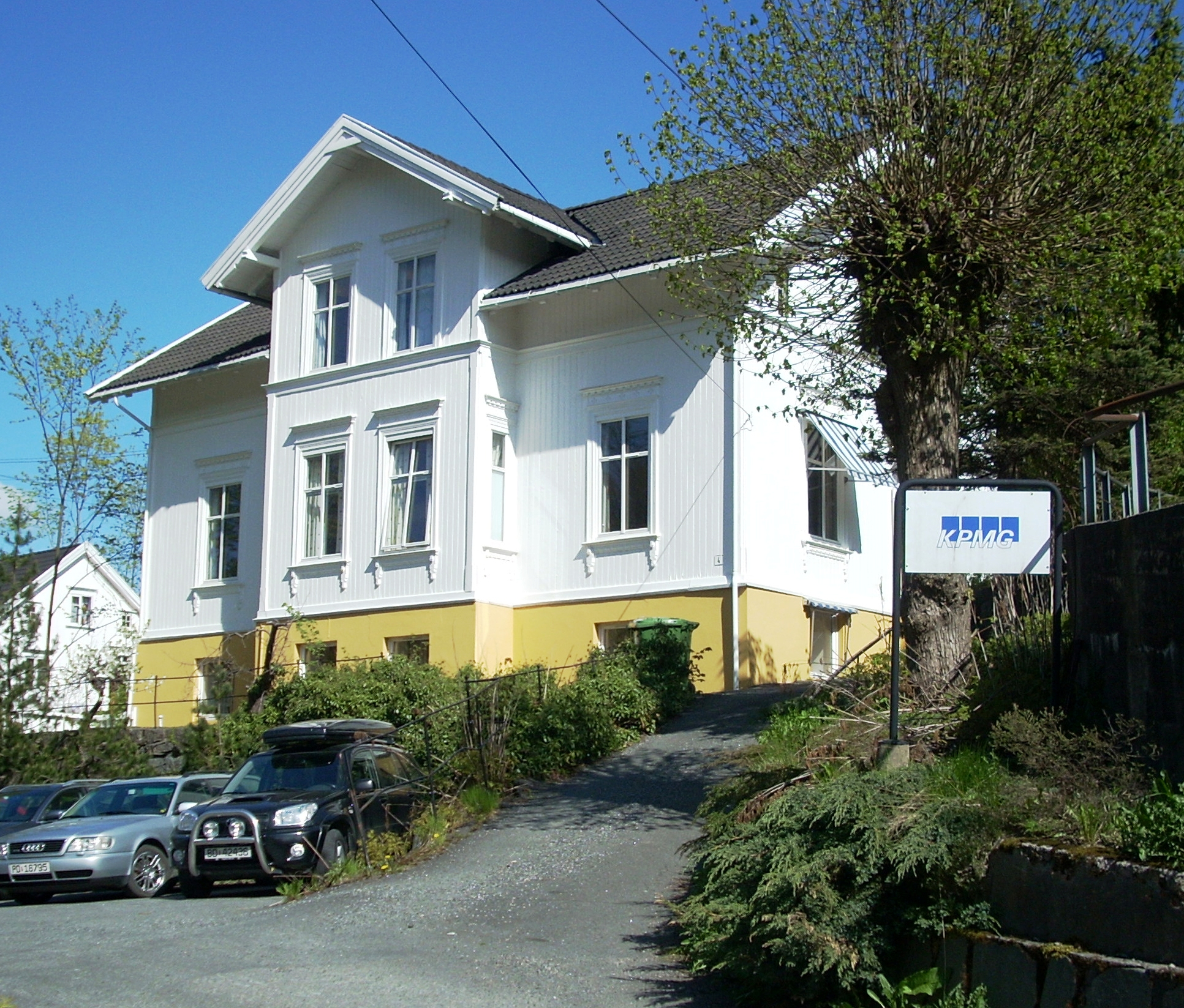 Iuellsklev 4, Arendal, tilholdssted for Gestapo under andre verdenskrig